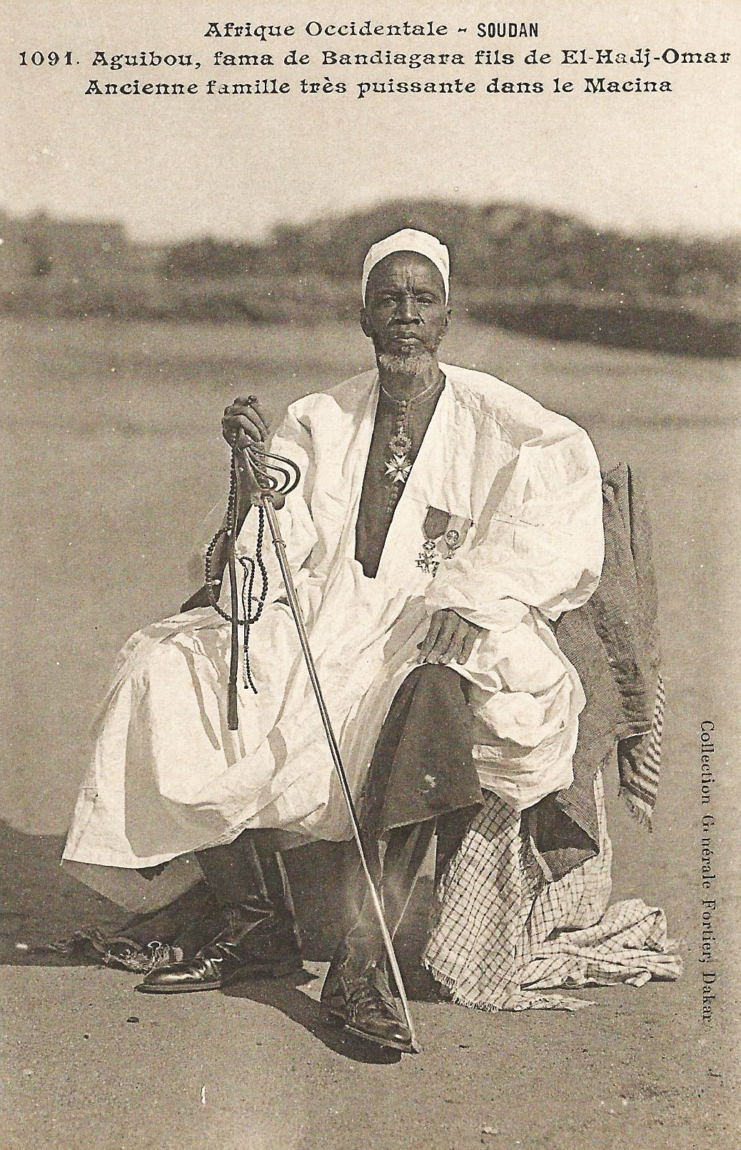 François-Edmond Fortier, Aguibou, fils de El-Hadj-Omar. Ancienne famille très puissante dans le Macina. Afrique Occidentale - Soudan.